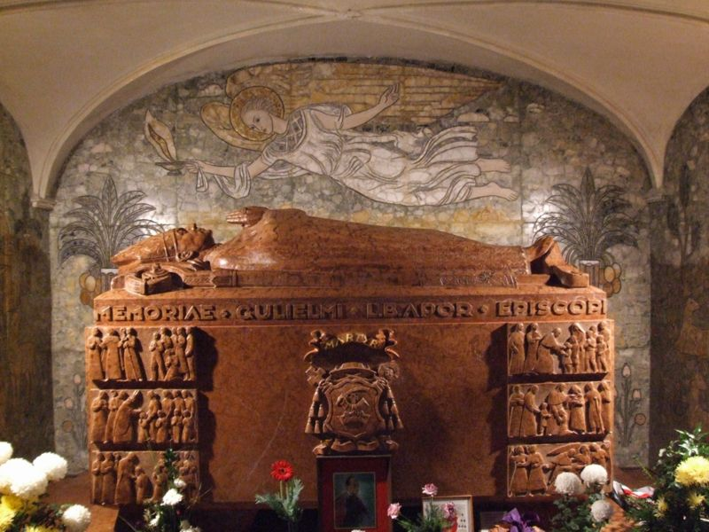 La tombe de Vilmos Apor à Györ